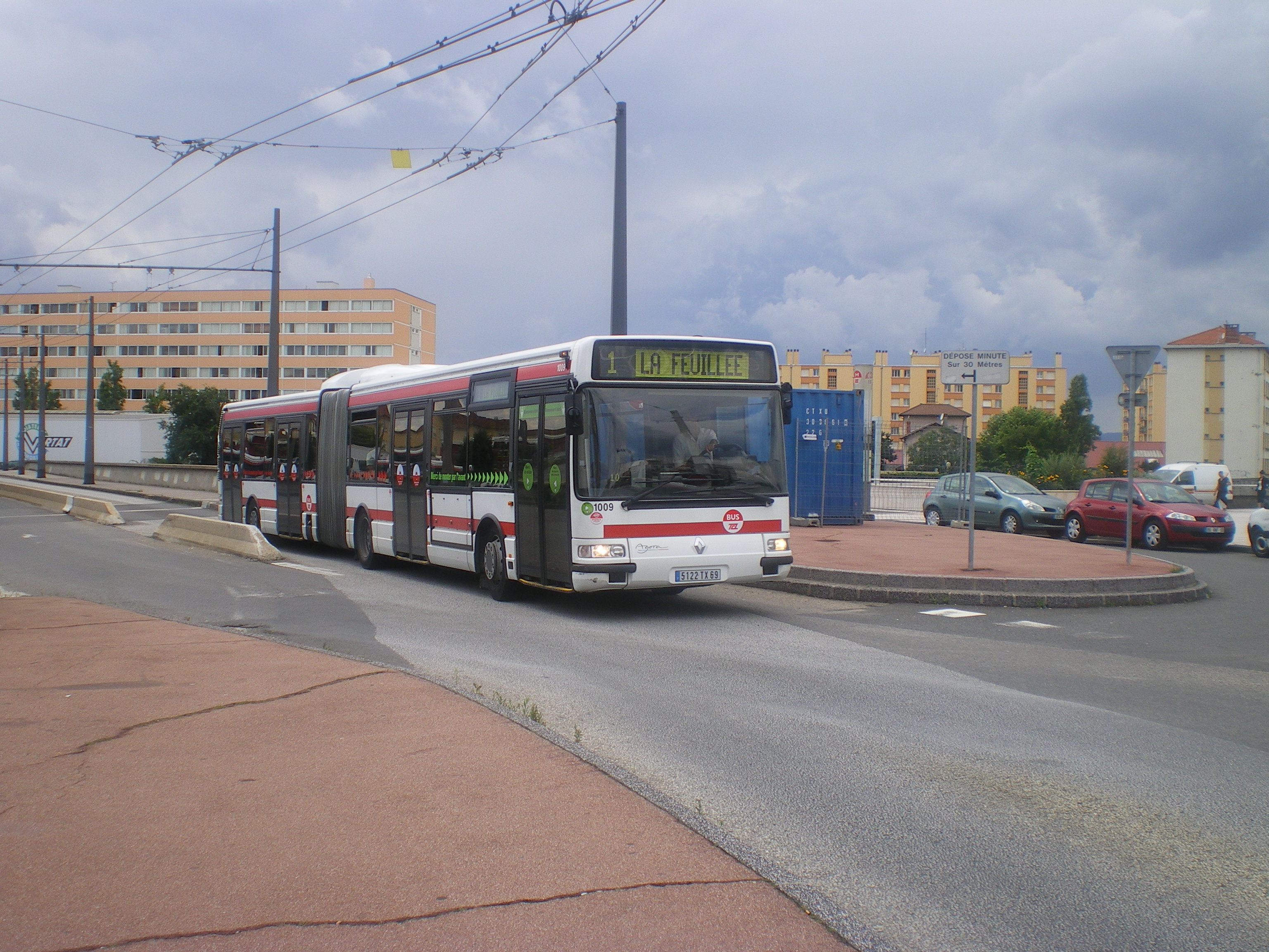 AgoraL circulant exceptionnellement sur la ligne 1, durant l'été 2007.